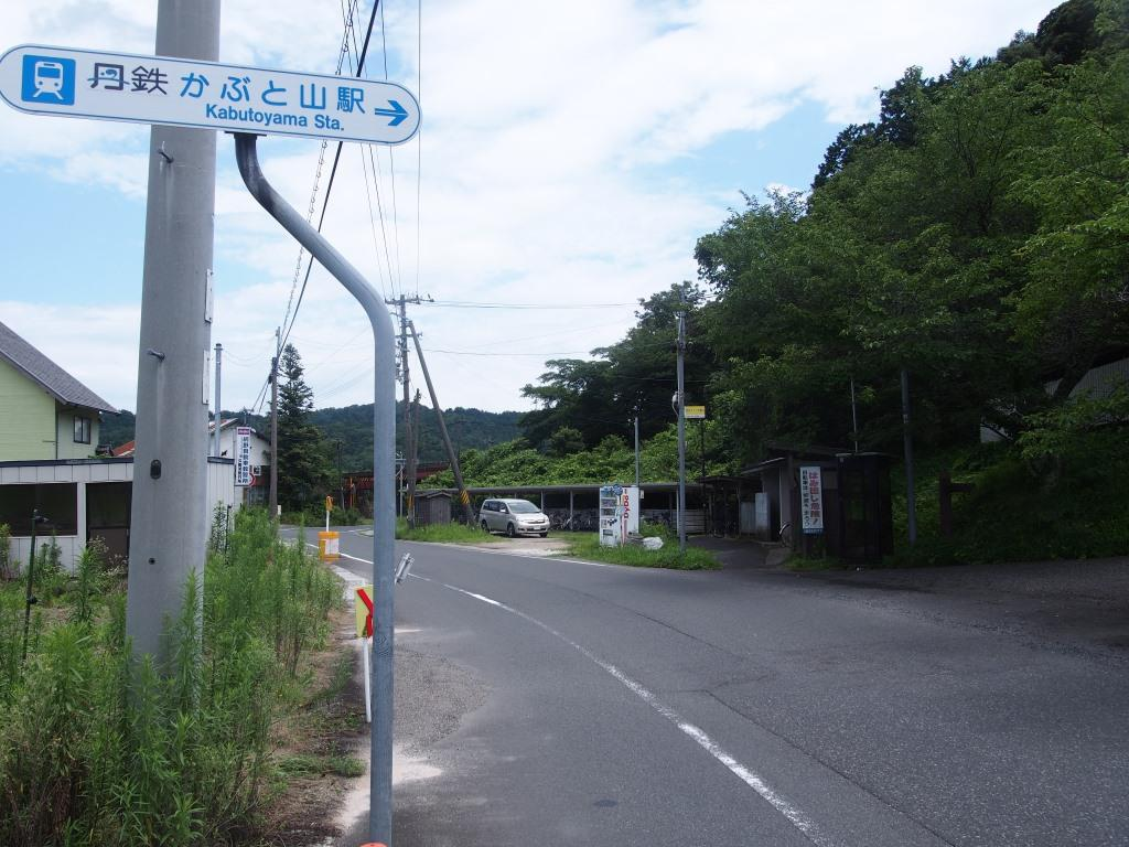 かぶと山駅（京都府京丹後市久美浜町甲山） 駅前付近